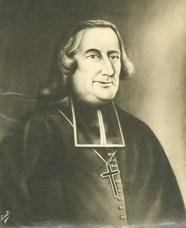 Portrait de Mgr Henri-Marie Dubreil de Pontbriand, évêque de Québec.